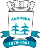 Anguera